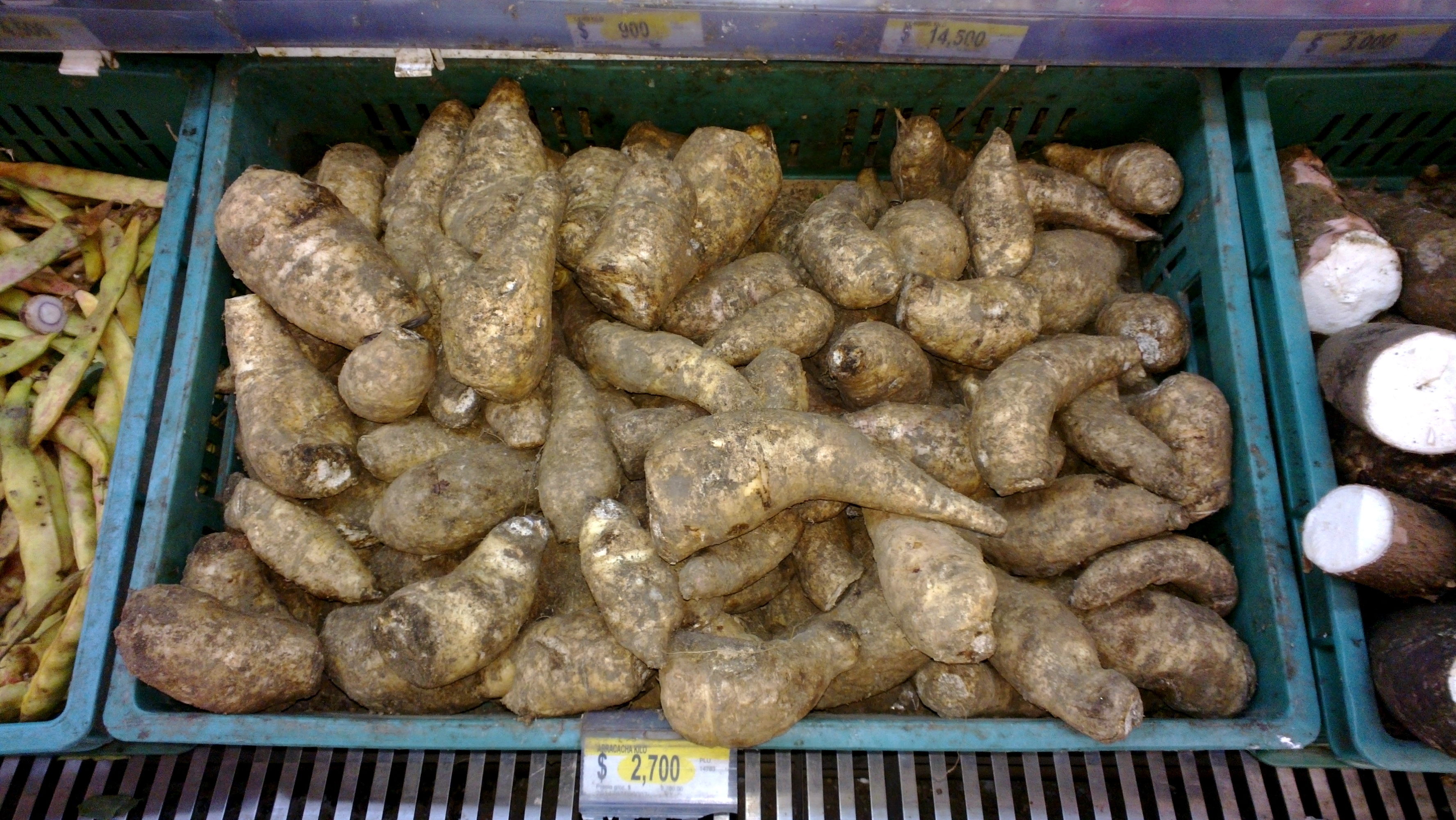 Arracachas en un supermercado de Colombia